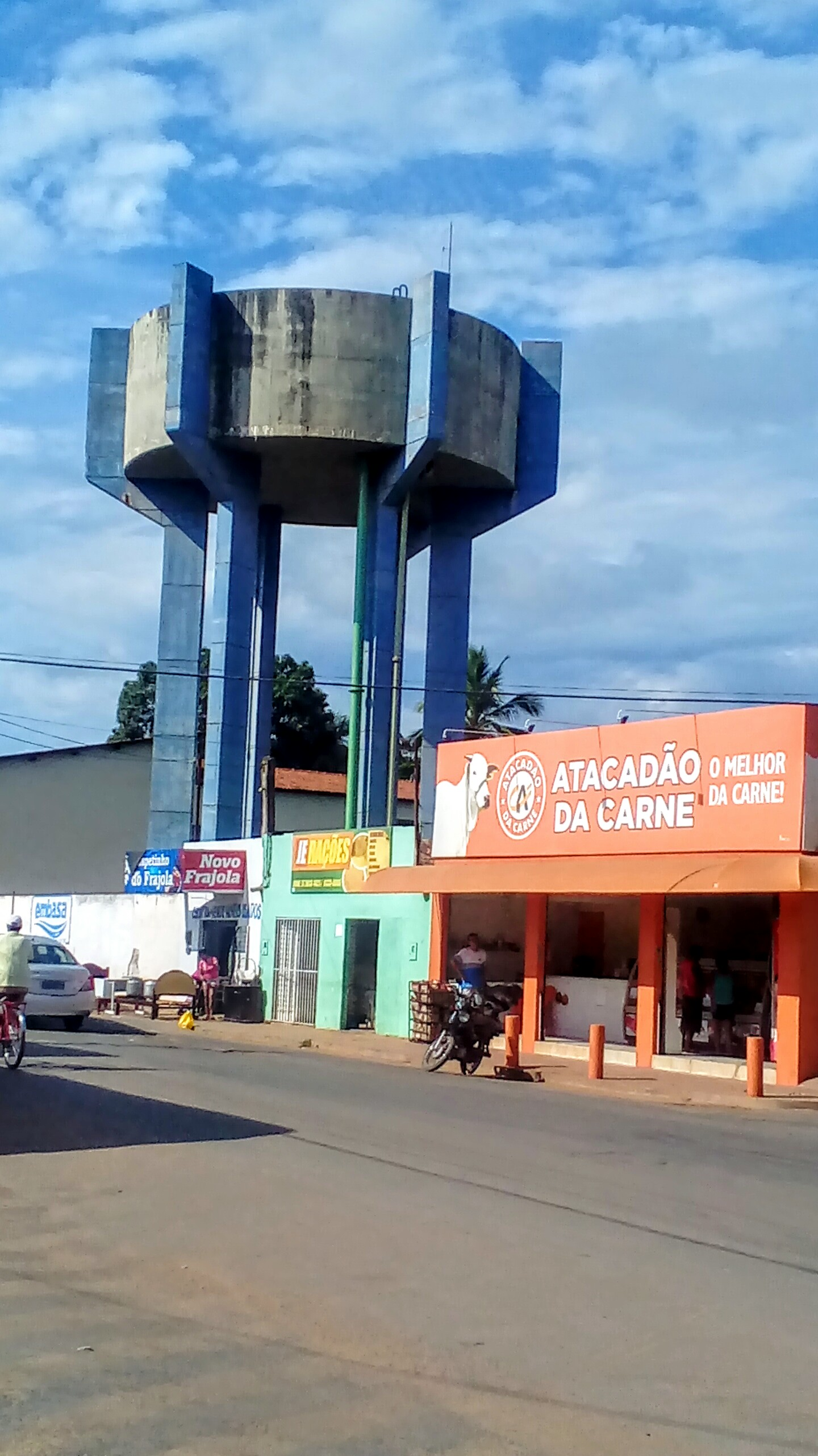 Caixa D' água no Bairro São Pedro, Reservatório de todo a região norte de Barreiras.